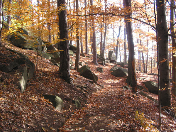 Höllengrund Großschweidnitz